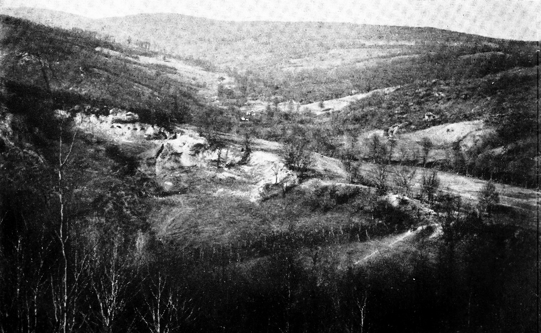 Stellung des RJB9 bei Muncelul (Nov. 1917 – Febr. 1918}